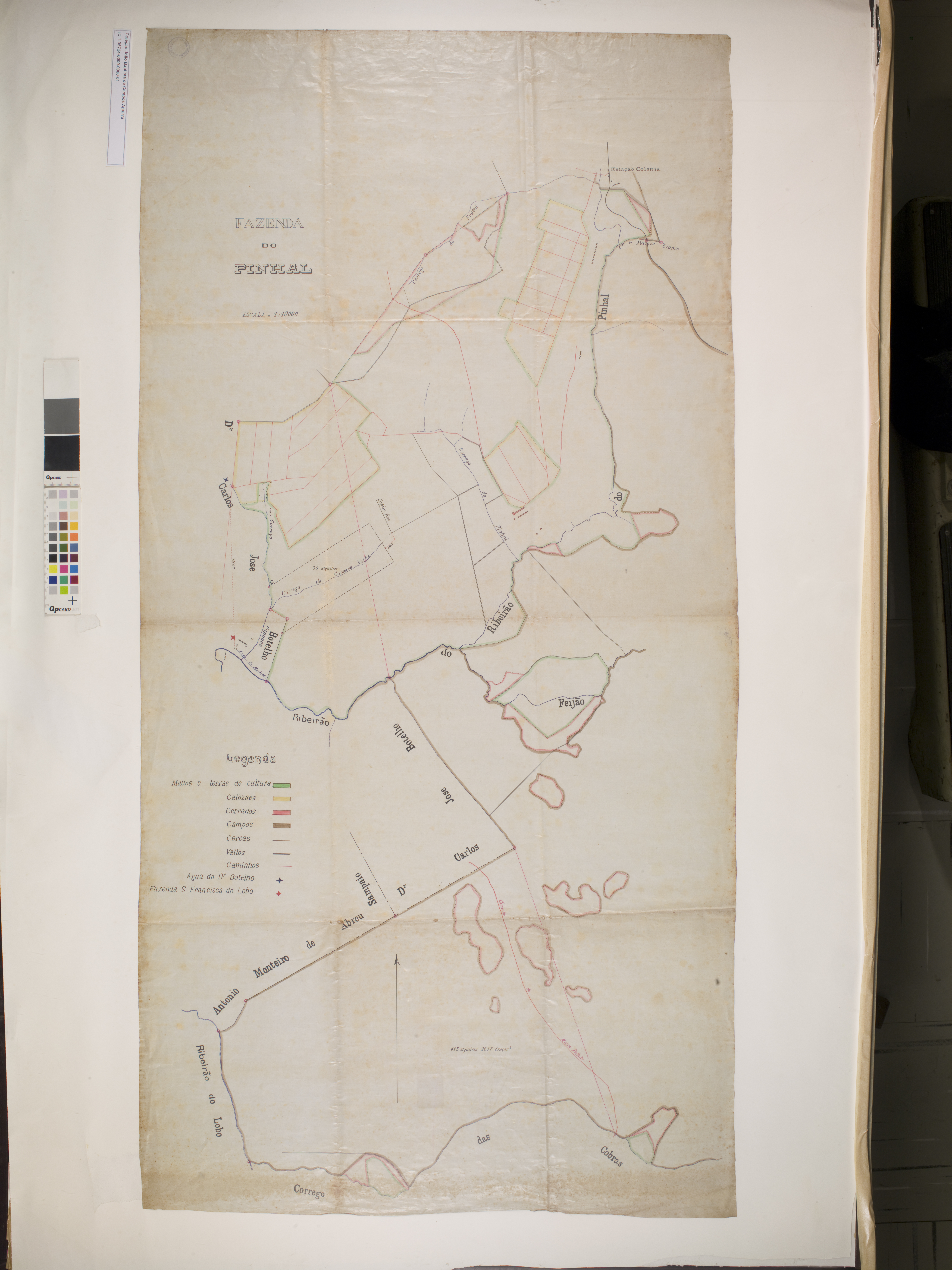 Obra que integra o acervo do Museu Paulista da USP. Coleção João Baptista de Campos Aguirra